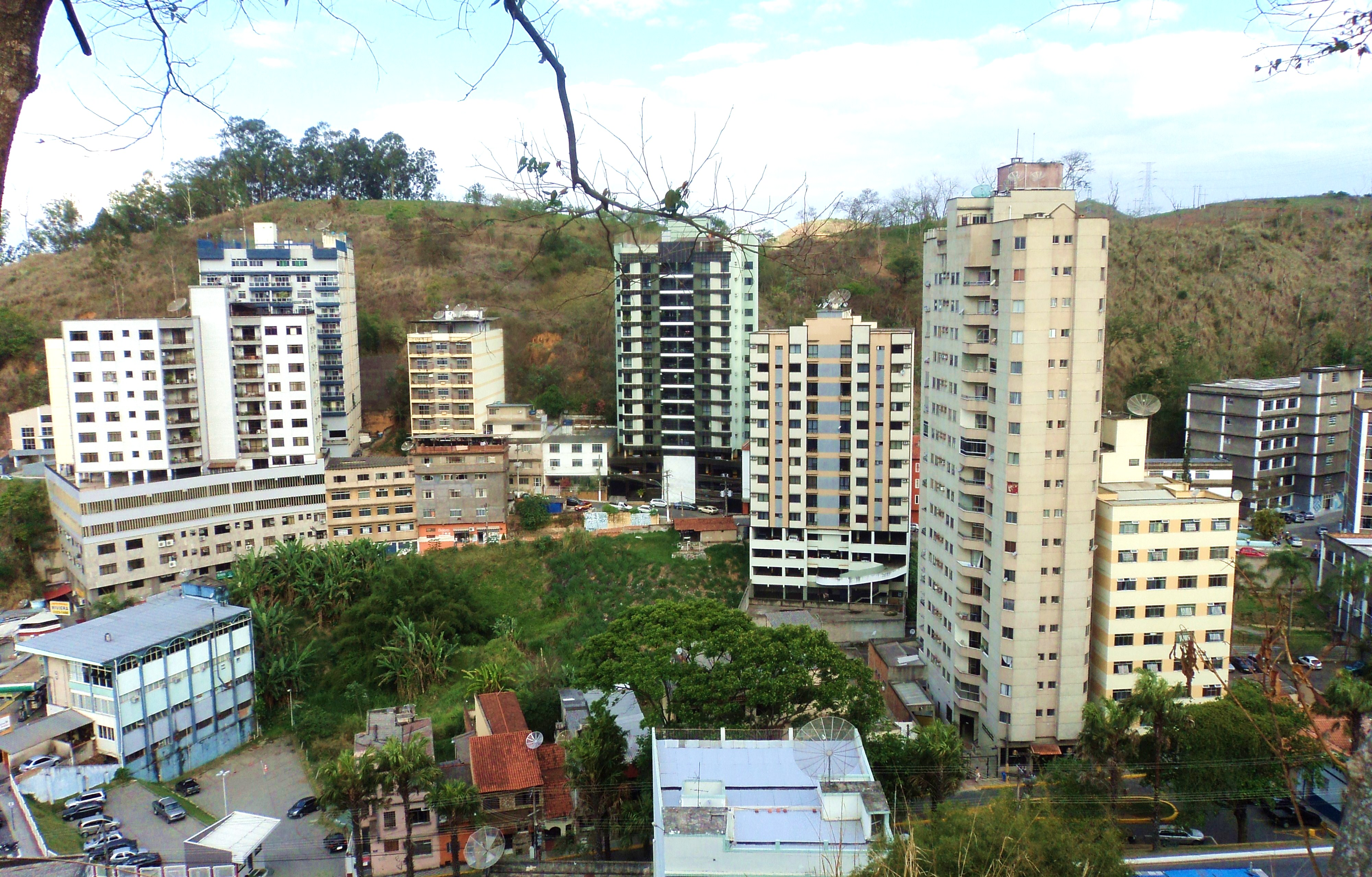 Visão Panorâmica da cidade de Barra Mansa, estado do Rio de Janeiro, Brasil.